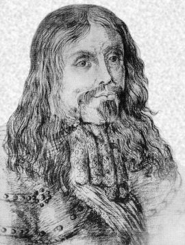 Portrait du Chevalier Paul. Anonyme, sans date.